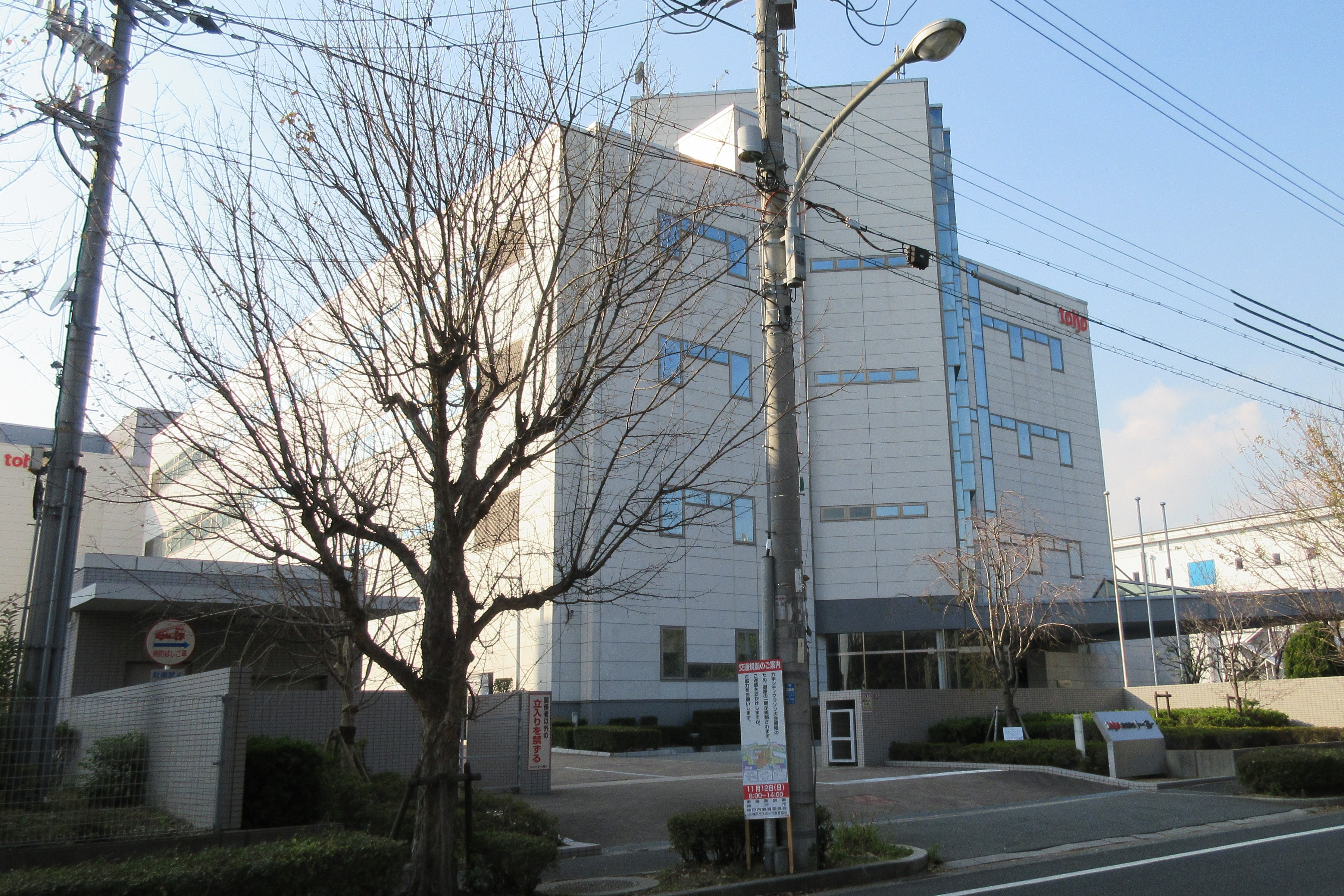 トーホー本社